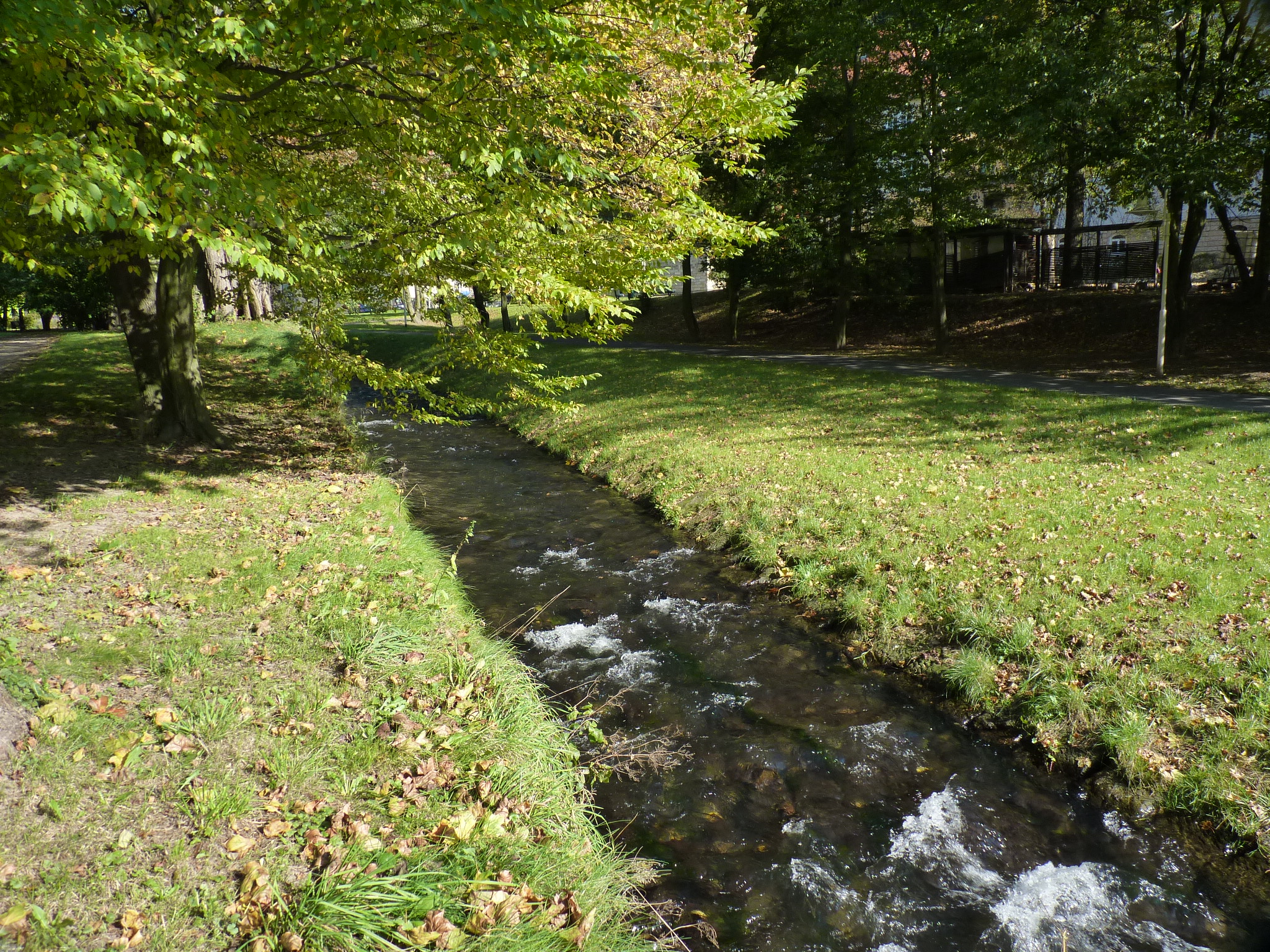 Die Kirnitzsch in Bad Schandau im Oktober 2014